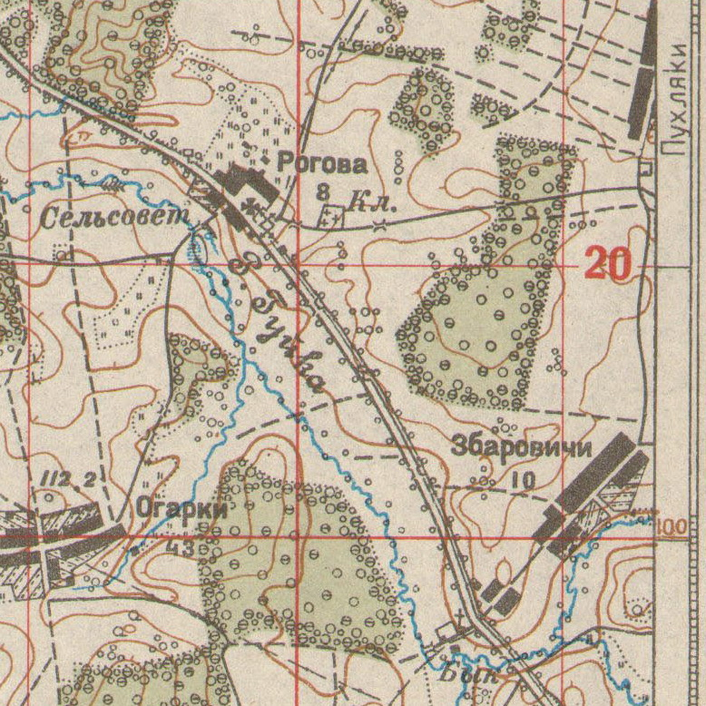 вёска Рагава на карце 1928 года